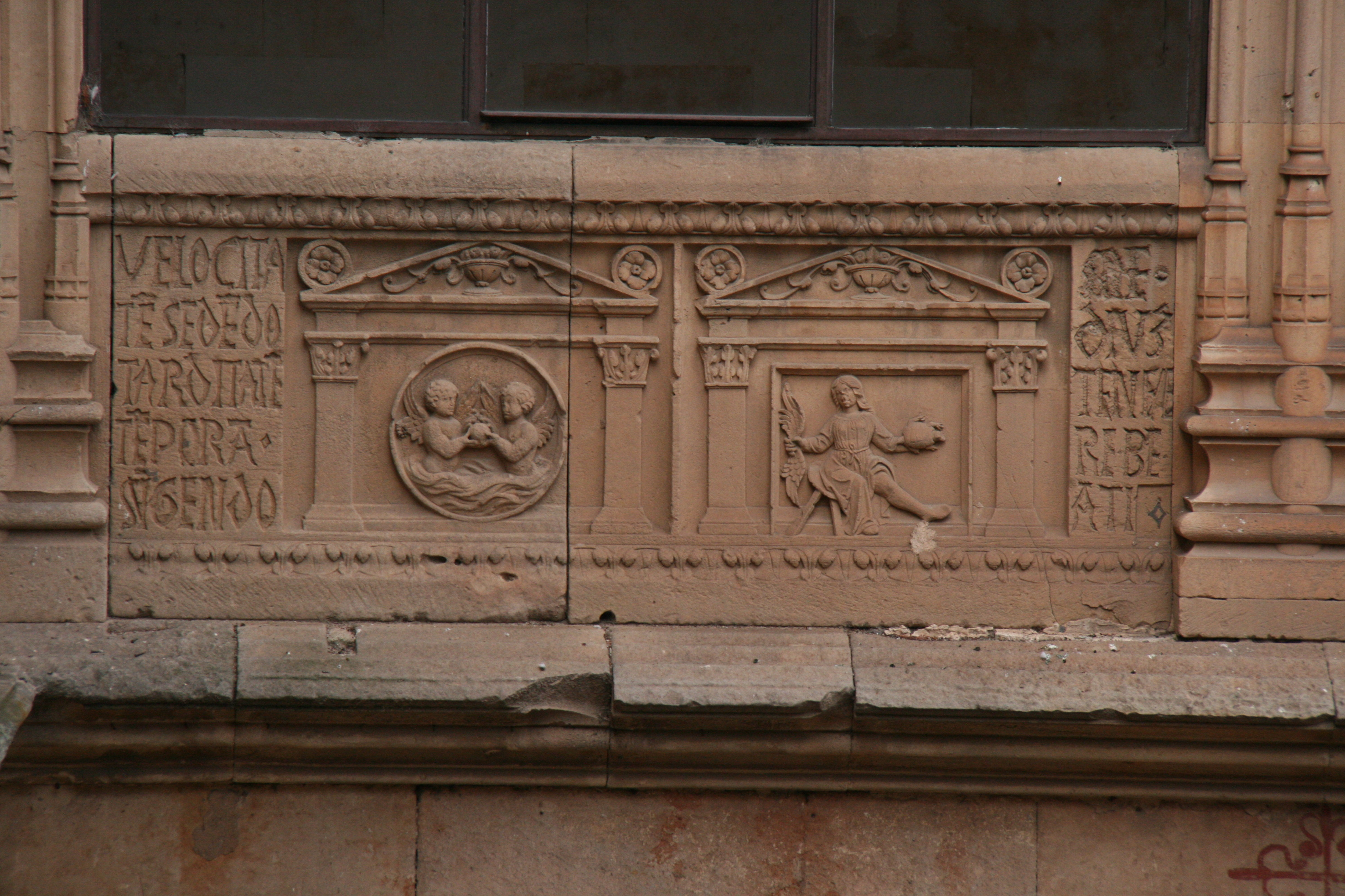 Primer enigma - VELOCITATEM SEDENDO TARDITATEM TEMPERA SURGENDO MEDIUM TENUERE BEATI